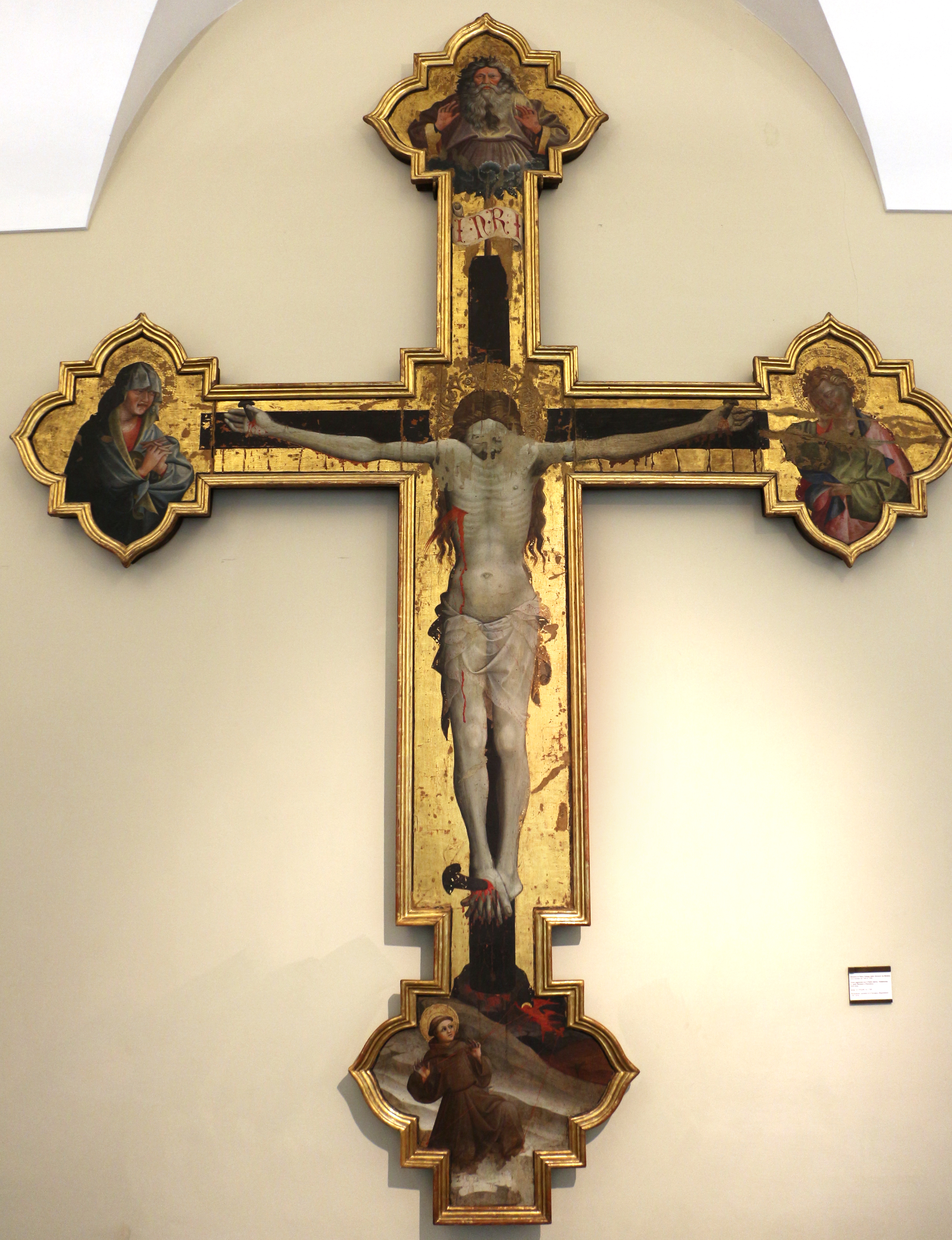 Pinacoteca Nazionale di Bologna This is a photo of a monument which is part of cultural heritage of Italy.